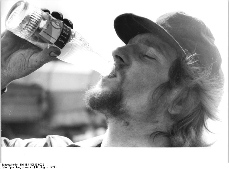 ADN-ZB Spremberg 16.8.74 Berlin: Getreideernte in der KAP Pankow. Hitze und Staub auf dem Feld machen Durst. Eberhard Huhn, Student des vierten Studienjahres von der Ingenieurhochschule Berlin-Wartenberg, gehört zu den Kombinefahrern, die mit 5 Mähdreschern auf den Feldern des VEG Berlin-Buch so schnell wie möglich das gefährdete Lagergetreide ernten. Die Jugendlichen wurden kürzlich als Wochensieger der in der Hauptstadt eingesetzten Komplexe des FDJ-Objektes Zentrale Erntetechnik ausgezeichnet.